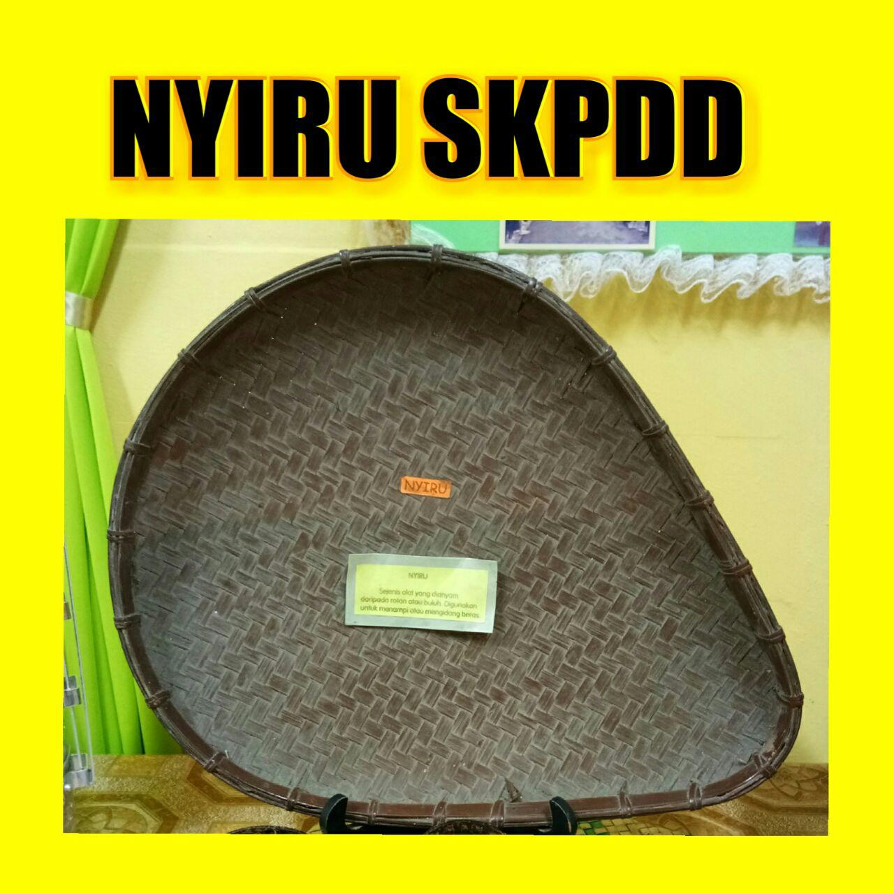 Nyiru